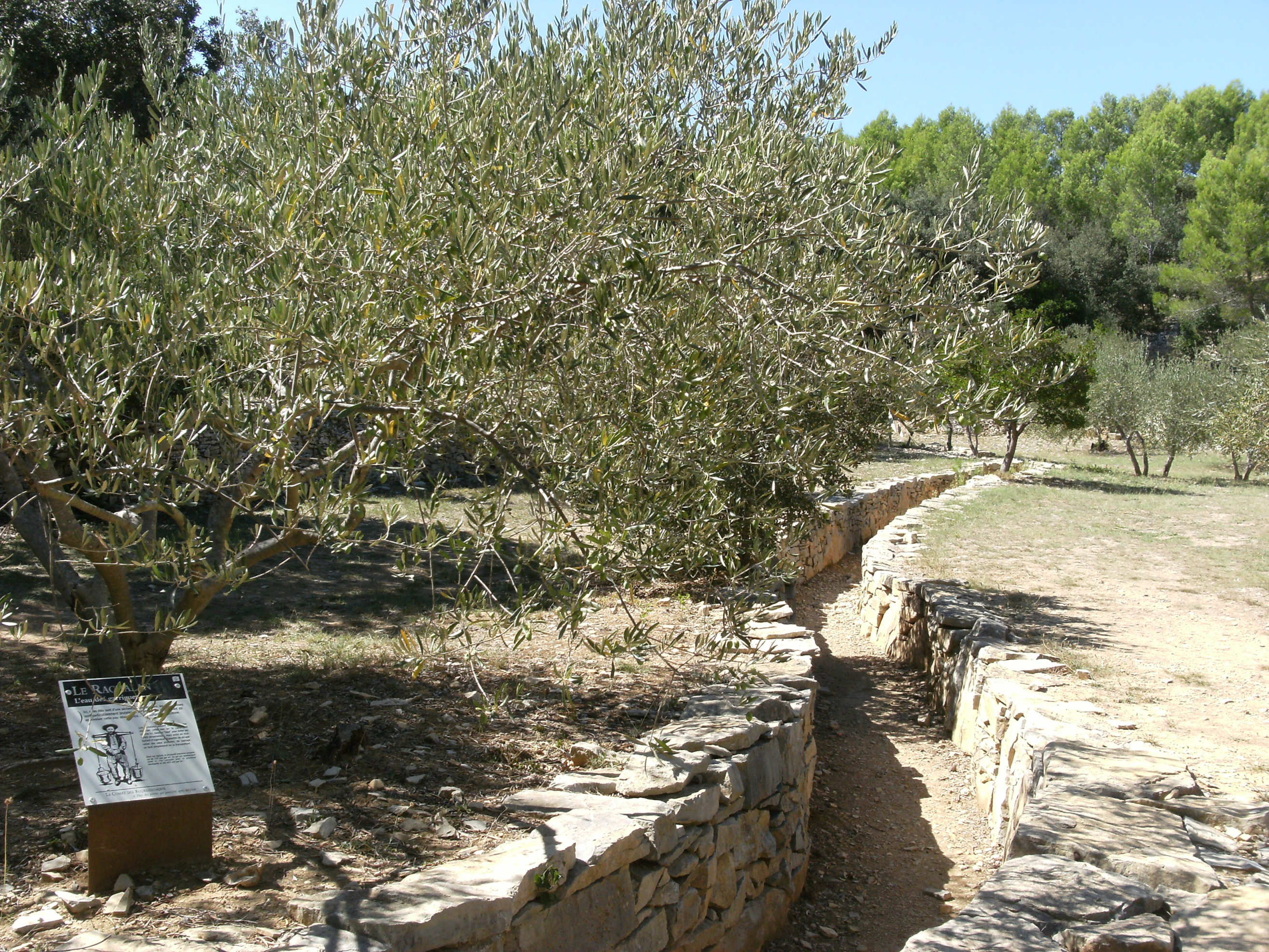 Béal sec dans la Combe des Bourguignons à Marguerittes